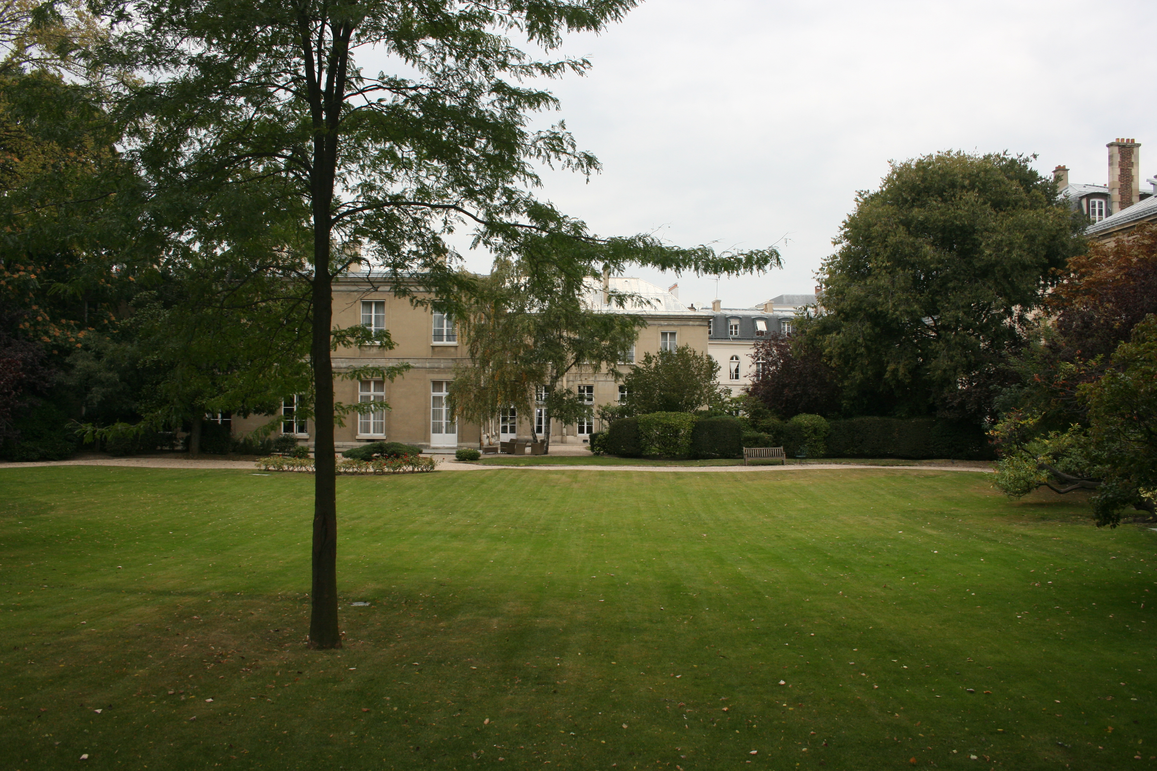 Cour intérieure du Ministère de l'Outre-mer, à Paris.